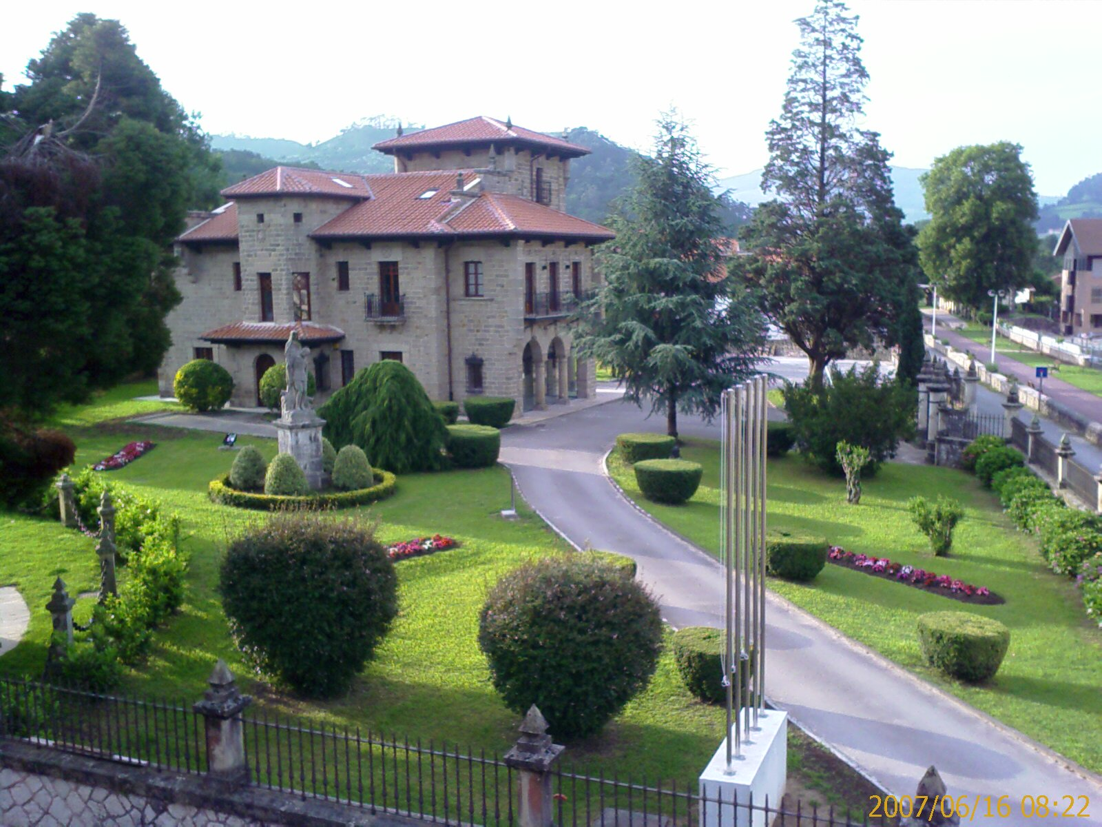 Casona de los Fuentes Pila, en Puente Viesgo (Cantabria, España)